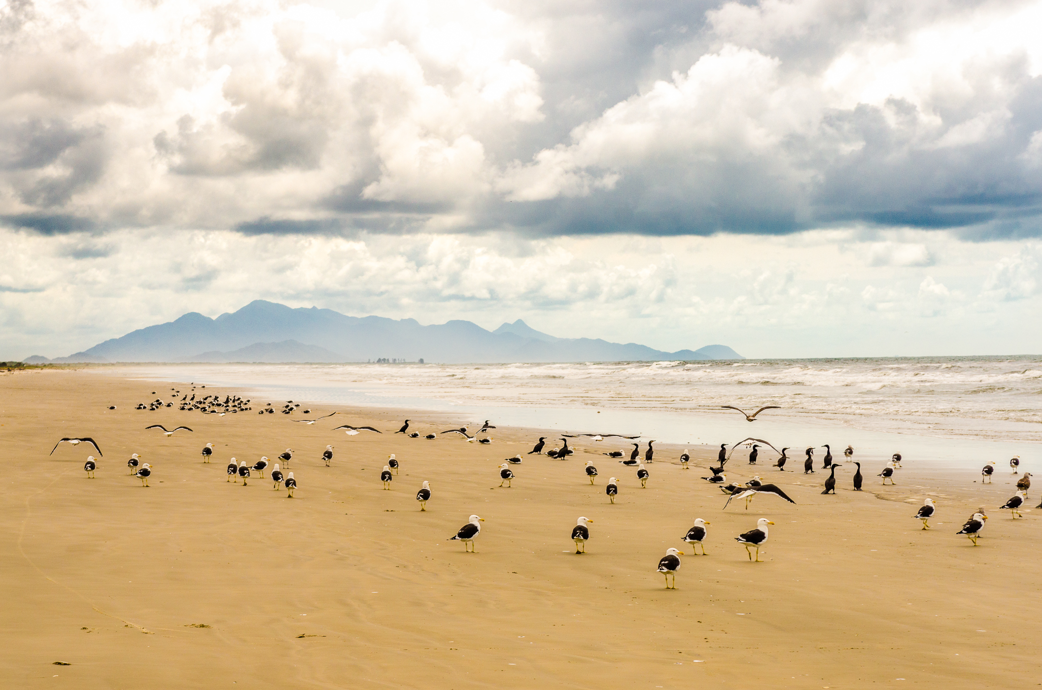 A Ilha do Superagui possui uma grande quantidade de aves marinhas, muitas delas migratórias.